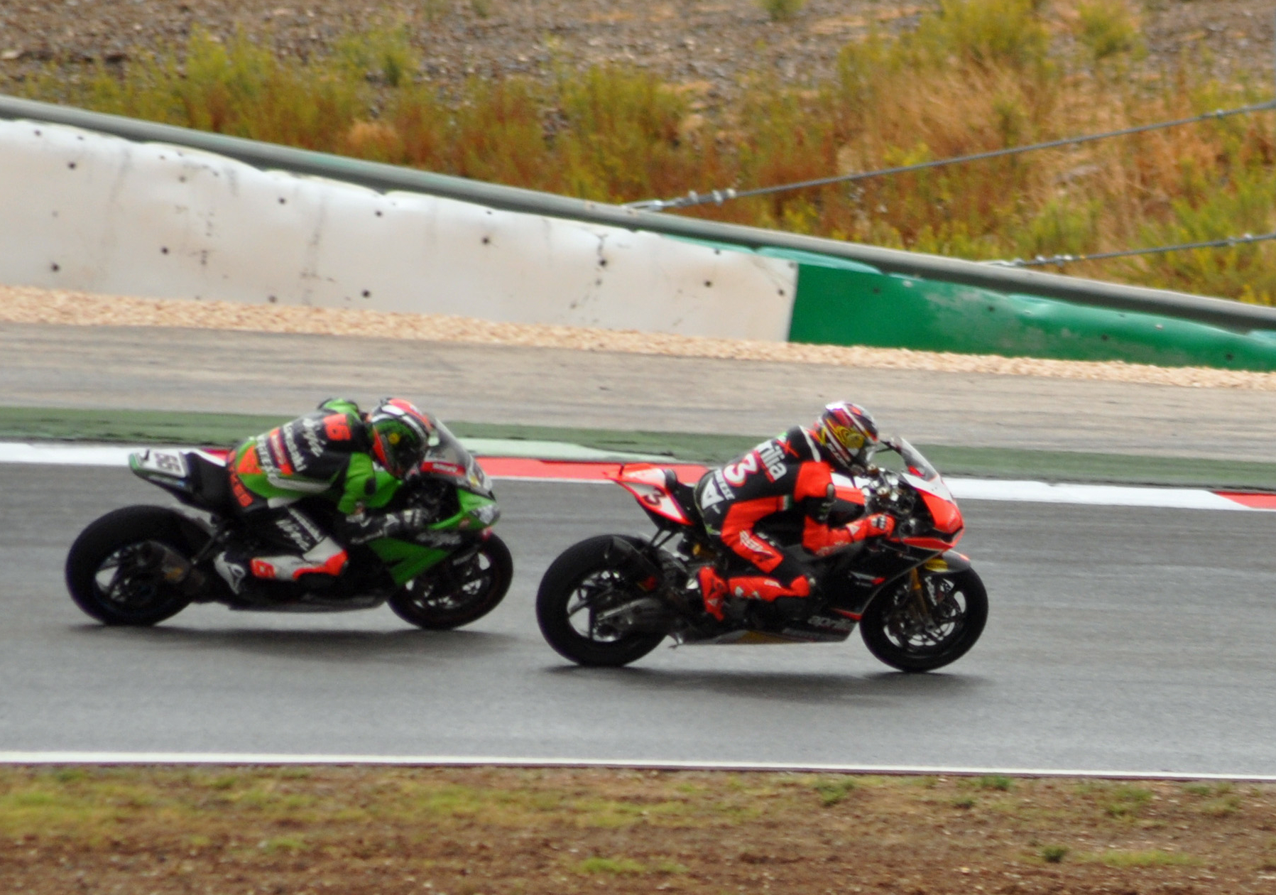 Autódromo Internacional do Algarve (2012-09-23), by Klugschnacker in Wikipedia (45) Tom Sykes (GBR) auf Kawasaki, Max Biaggi (ITA) auf Aprilia